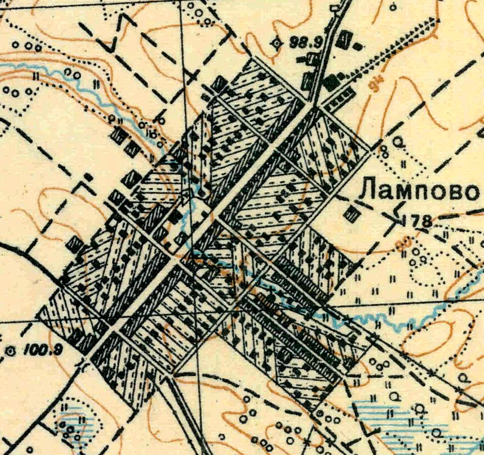 Топографическая карта Ленинградской области, квадрат О-36-25-А-а (Лампово), деревня Лампово